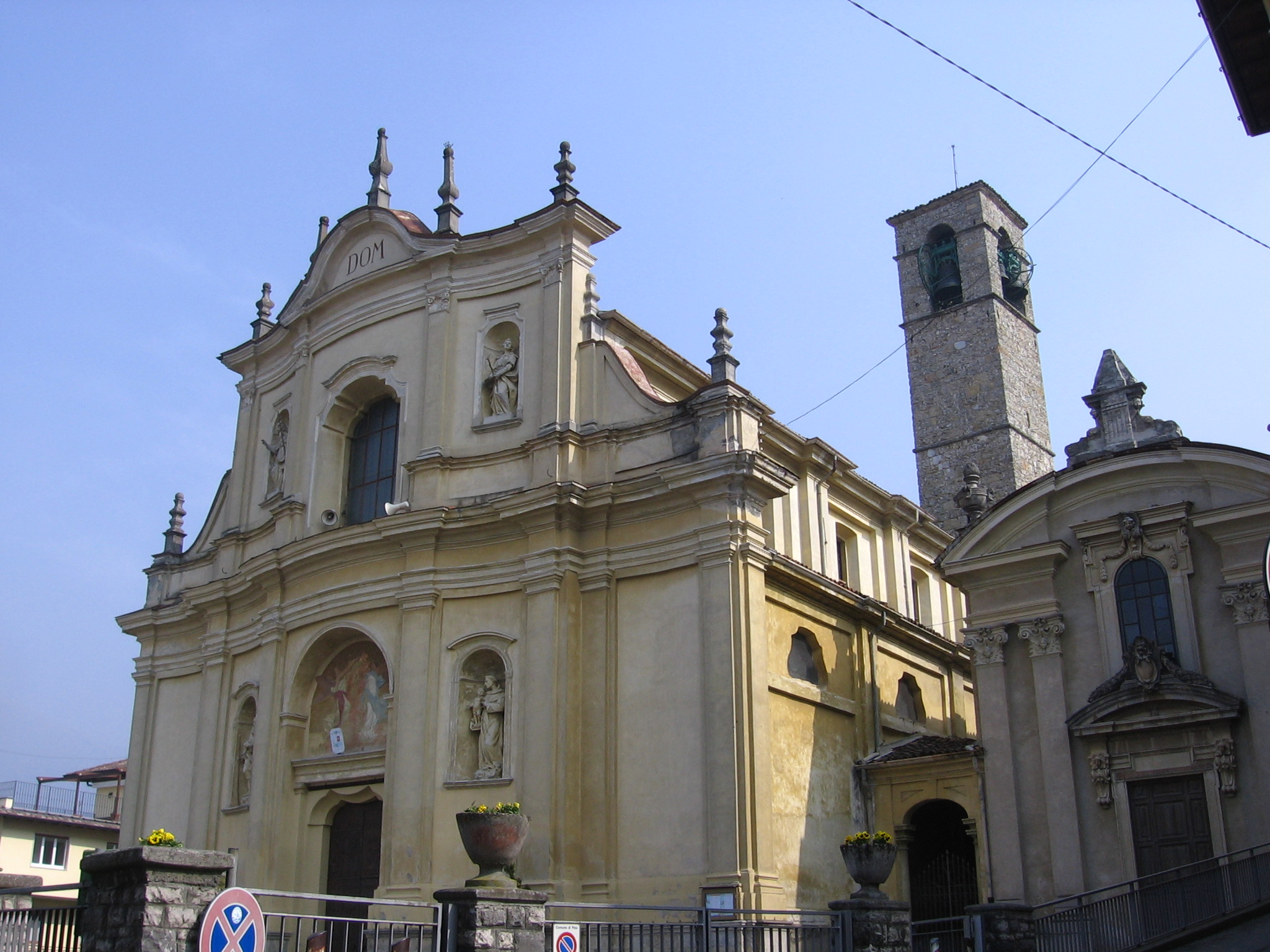 Peia, Bergamo, Italia